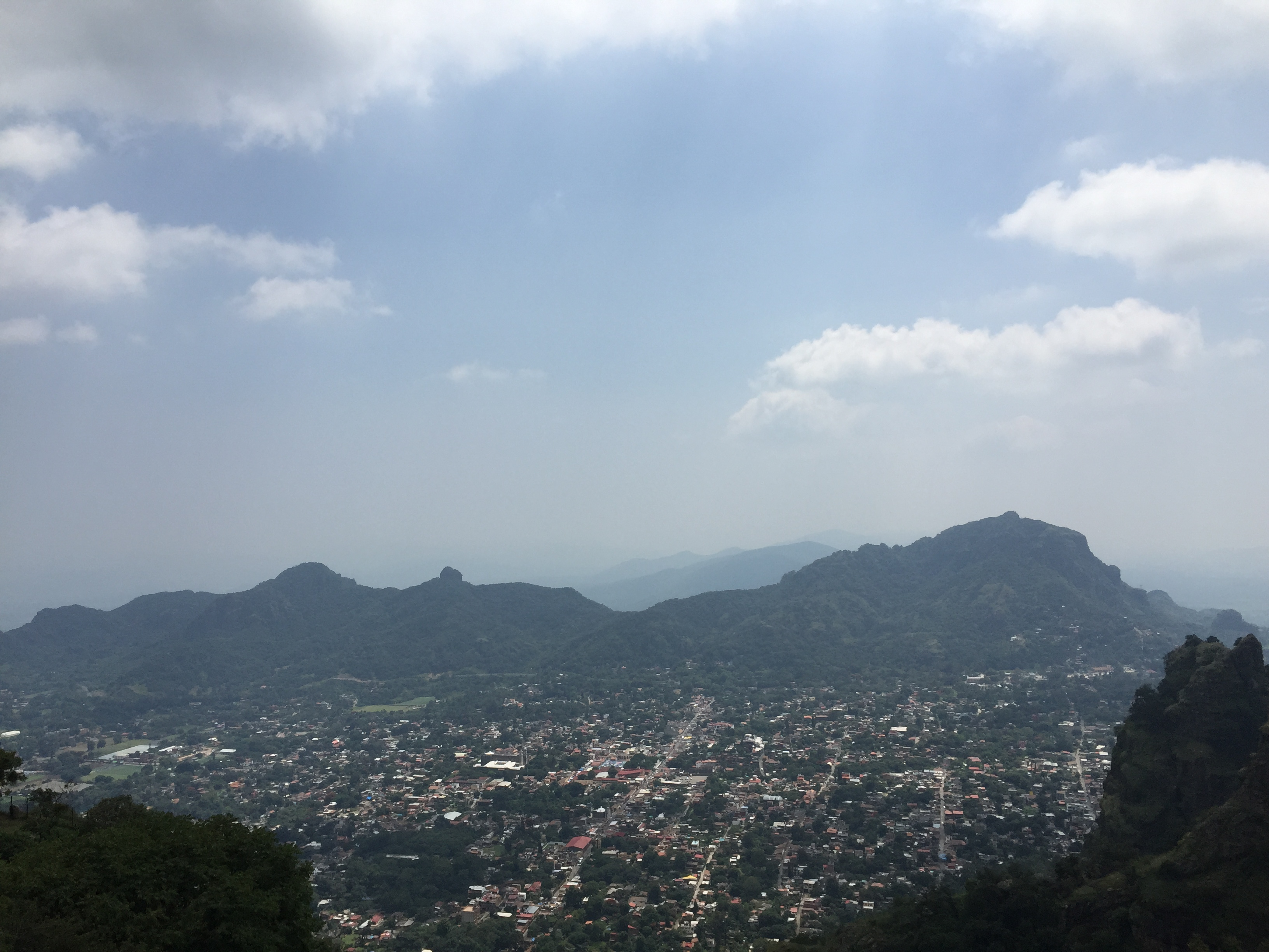 Vista panorámica del pueblo mágico de Tepoztlán, Morelos.